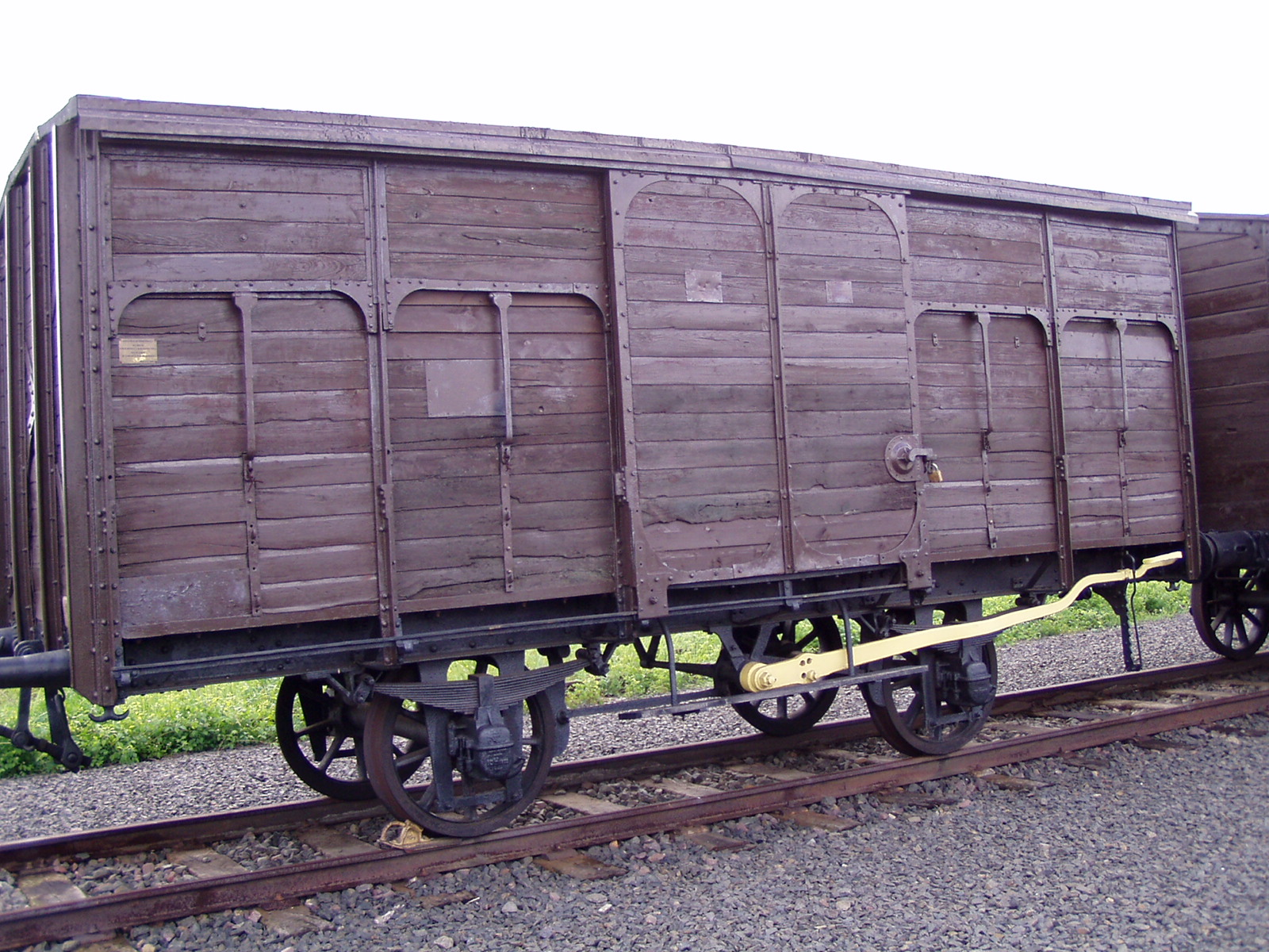 Vagón na Judenrampe (Židovská rampa) u koncentračního tábora Auschwitz-Birkenau Railcar at Judenrampe (Jewish ramp) near Auschwitz-Birkenau concentration camp Wagon przy Judenrampe (Rampa zydowska) niedaleko obozu koncentracyjnego Auschwitz-Birkenau